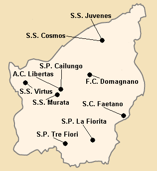 Répartition des clubs en Serie A1 1994-1995.